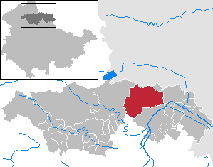 Bad Frankenhausen in Thuringia - Kyffhäuserkreis